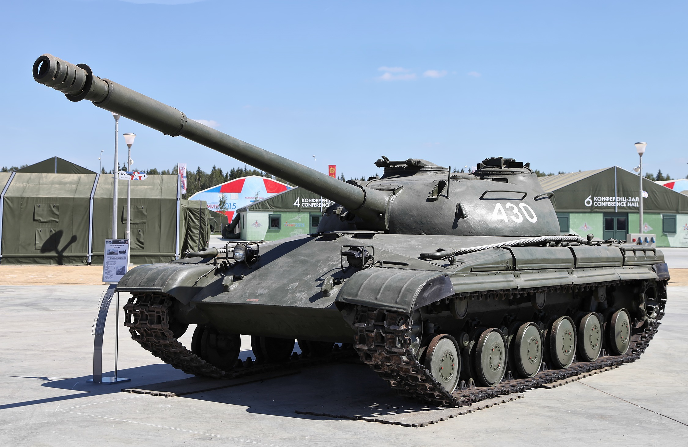 Опытный танк "Объект 430" в экспозиции парка "Патриот".